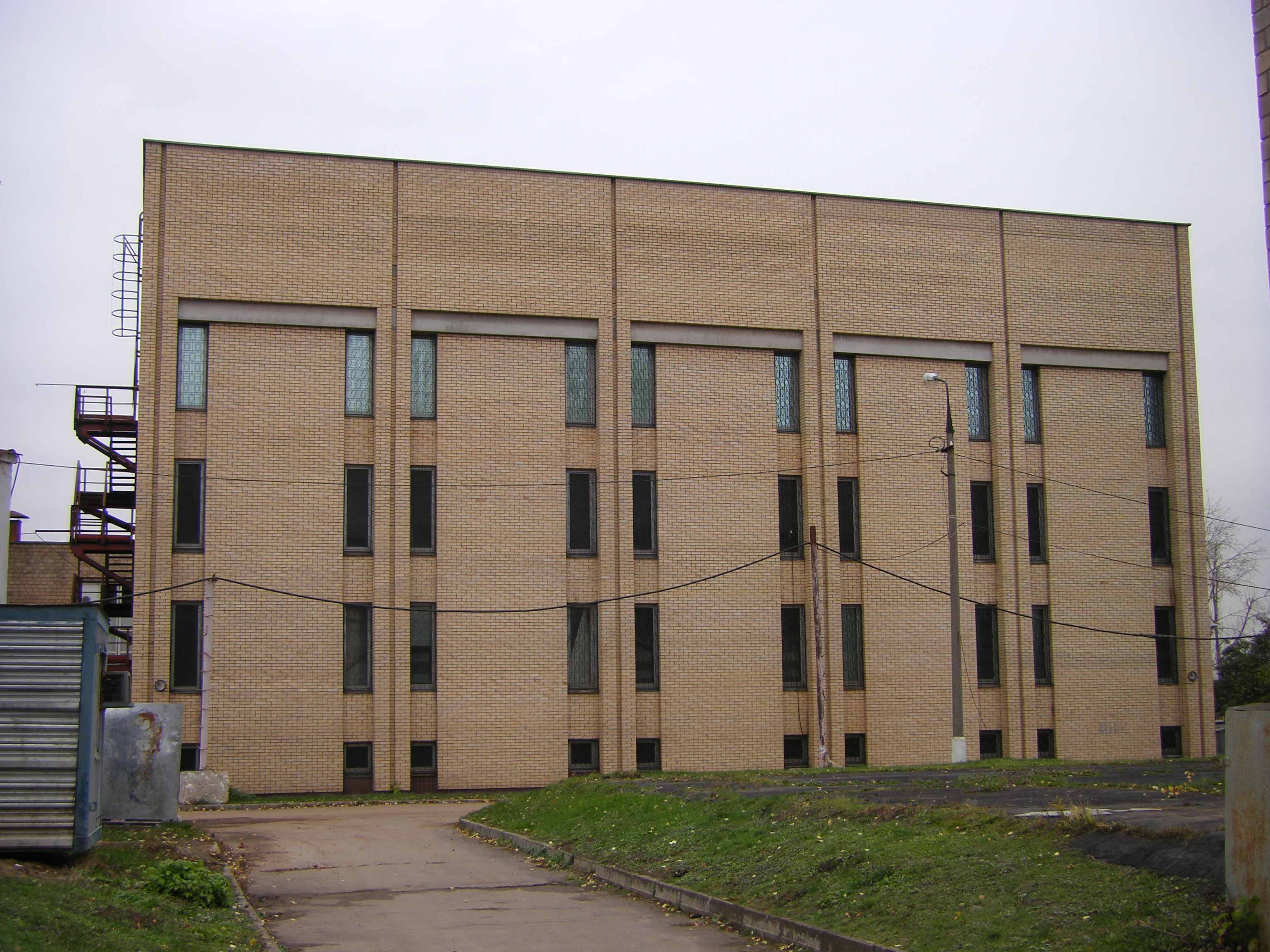 Здание, в котором расположен «НЕВОД».